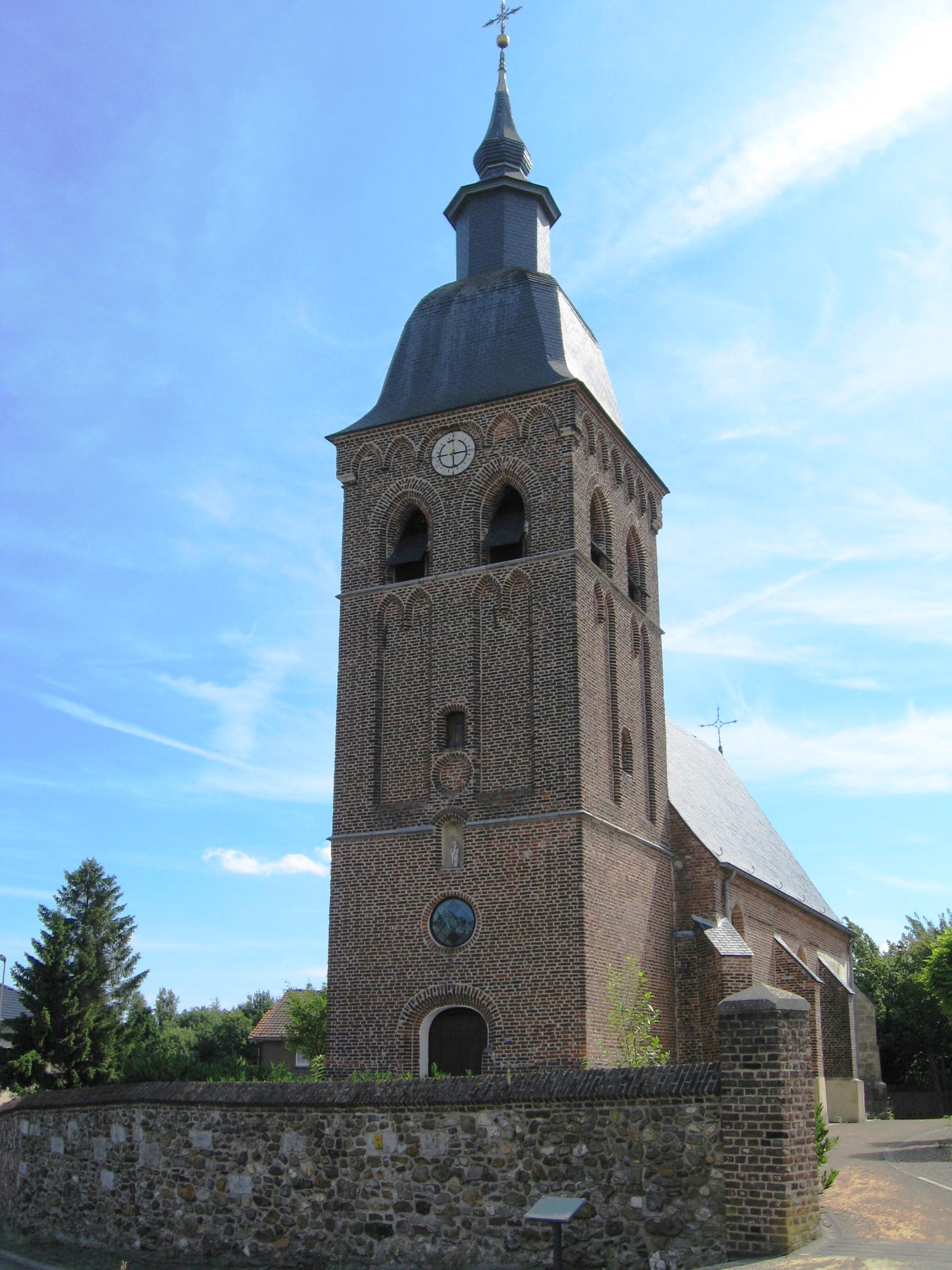 Onze-Lieve-Vrouw van Zeven Weeën, voormalige parochiekerk van Laak in Houthalen